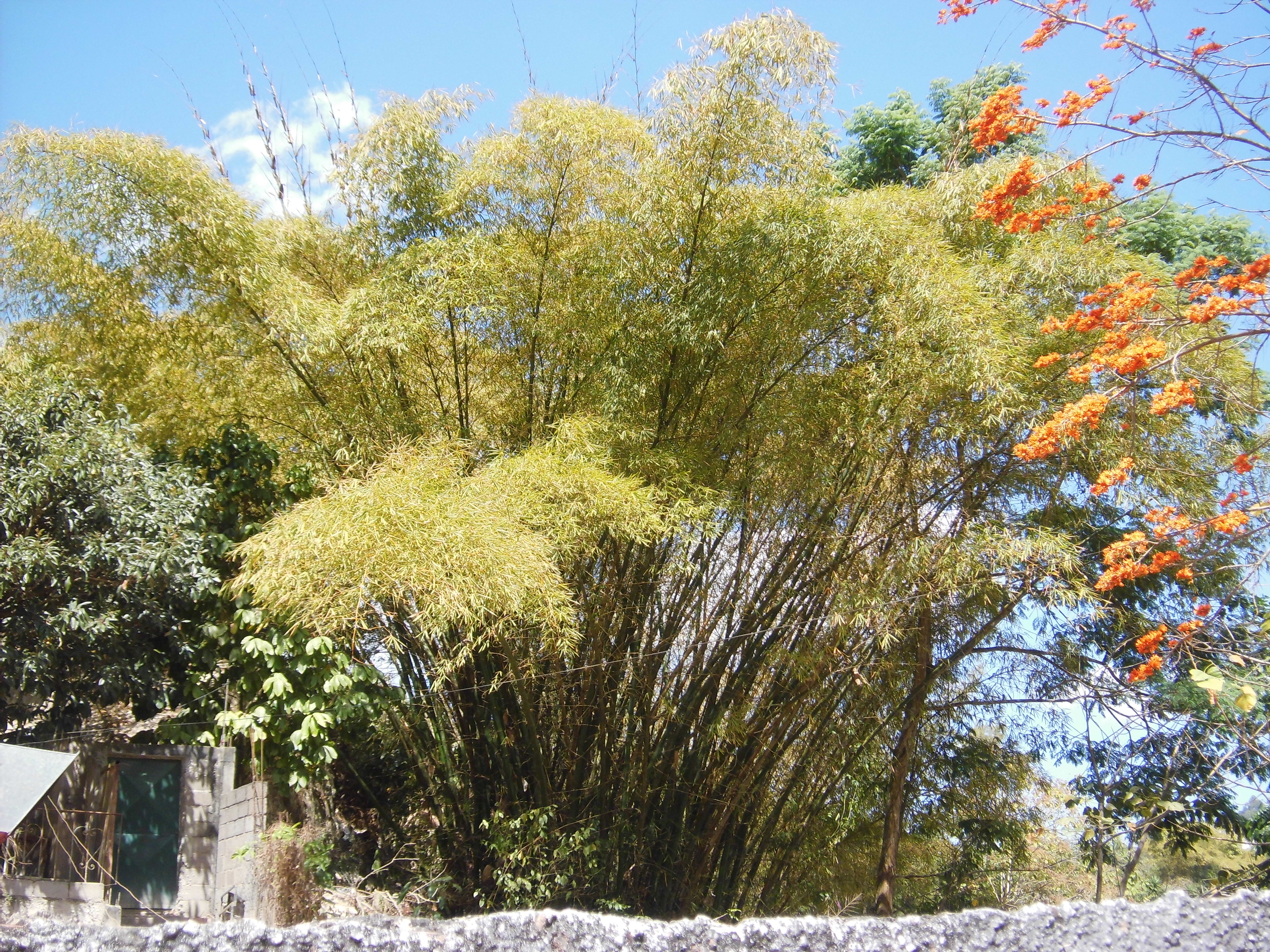 Bambusa vulgaris Schrad. ex J.C.Wendl. localizado a la entrada de Los Pinos 2 en el municipio El Hatillo, estado Miranda - Venezuela